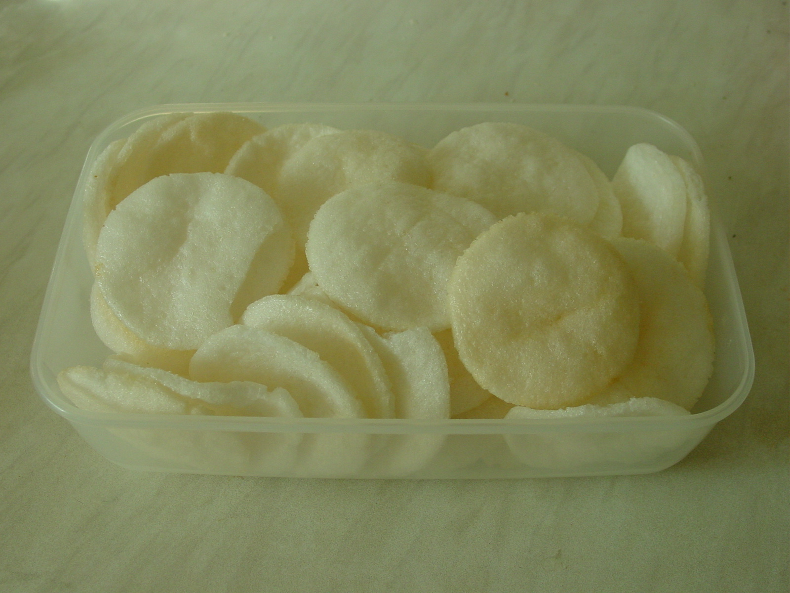 Kerupuk